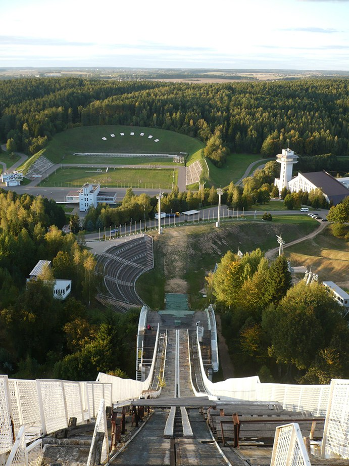 Цэнтр алімпійскай падрыхтоўкі Раўбічы